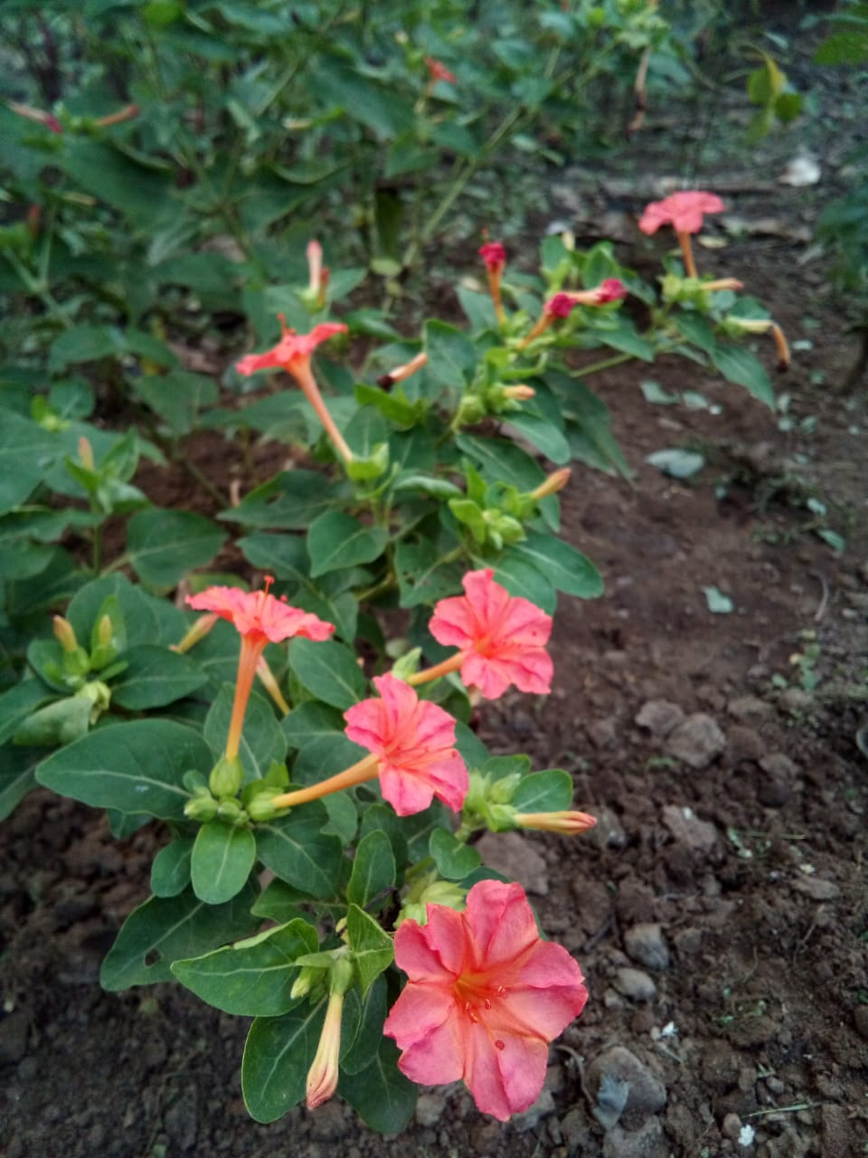 Jawa: kembang gégér sore yaiku kembang sing mekar nalika ing wanci sore nganti esuk. menawa wayah esuk nganti awan, kembang iki mingkup. kembang iki duweni isi warna ireng. kembang iki warna jingga.